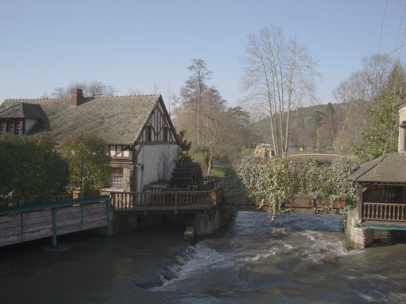 Moulin sur l'Eure à Houlbec-Cocherel